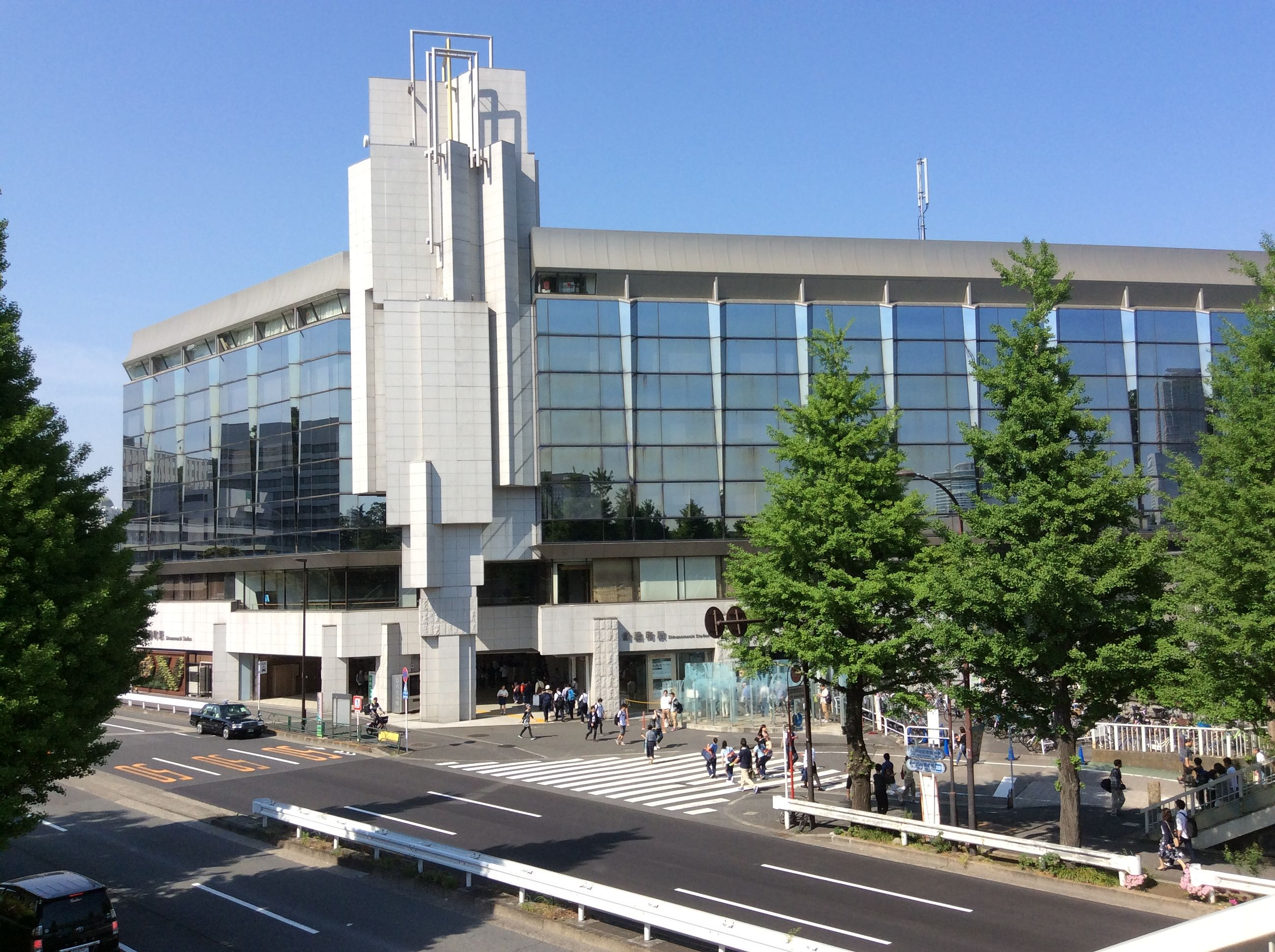 信濃町駅駅舎